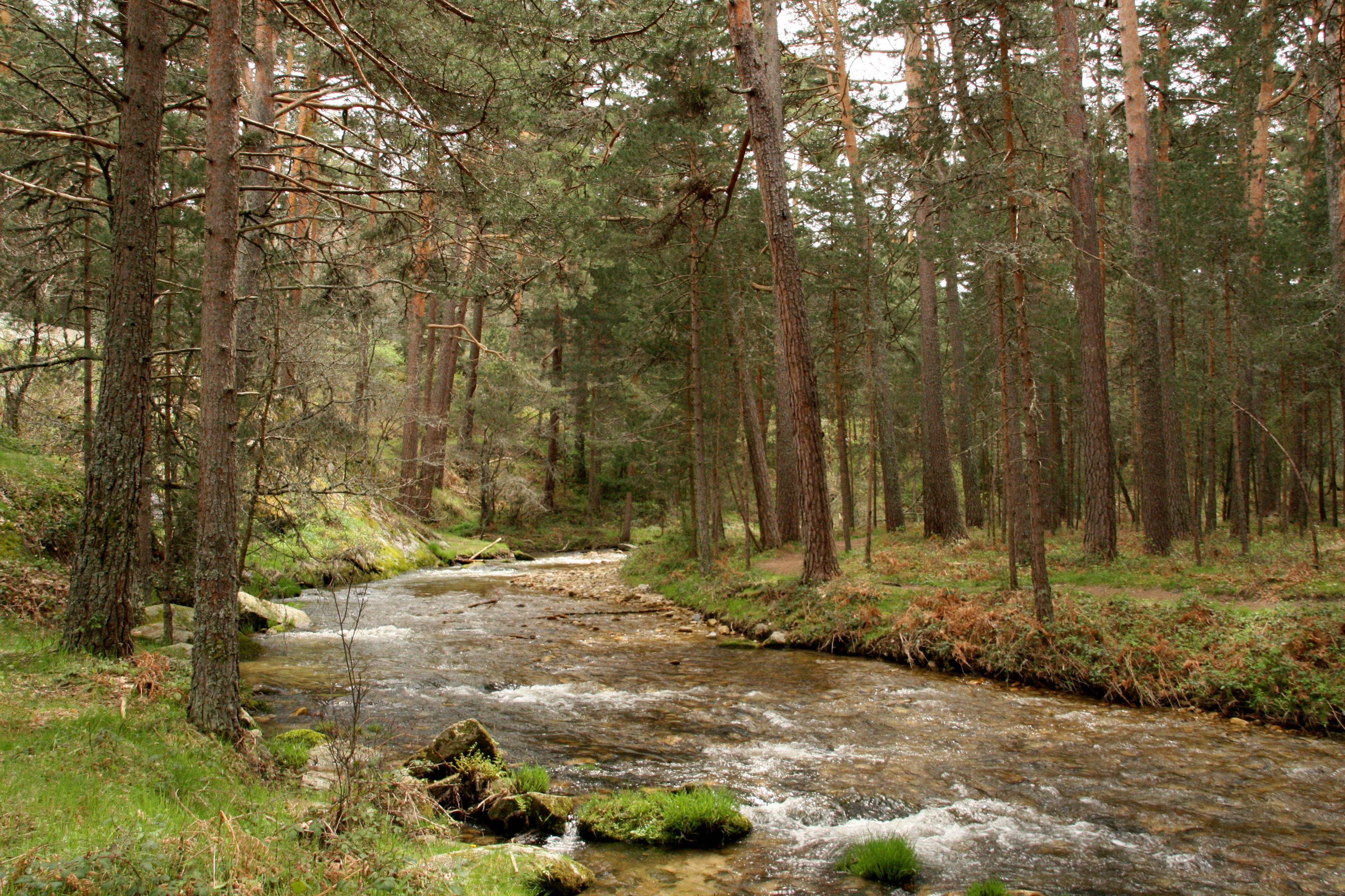 Río Eresma en la zona de los montes de Valsaín, en las inmediaciones del área recreativa de Los Asientos. Forma parte del lugar de interés comunitario de la Sierra de Guadarrama y del parque natural Sierra Norte de Guadarrama. This is a photography of a Special Area of Conservation in Spain with the ID: ES4160109. Natura2000 entry, EEA entry